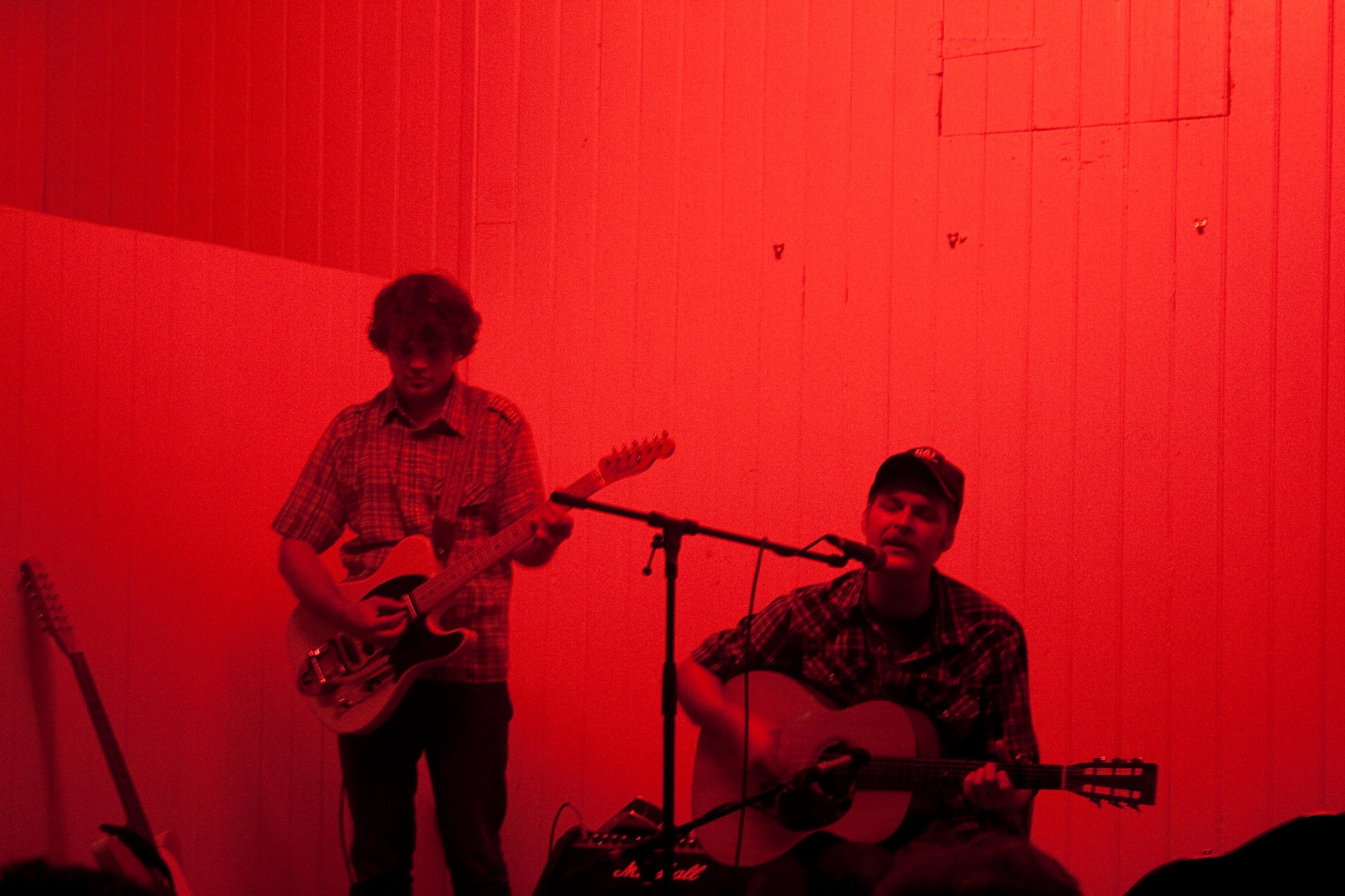 Hiss Golden Messenger live in 2011